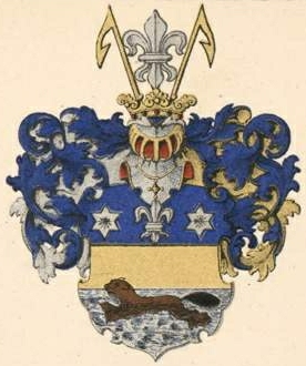 Ficki suguvõsa aadlivapp